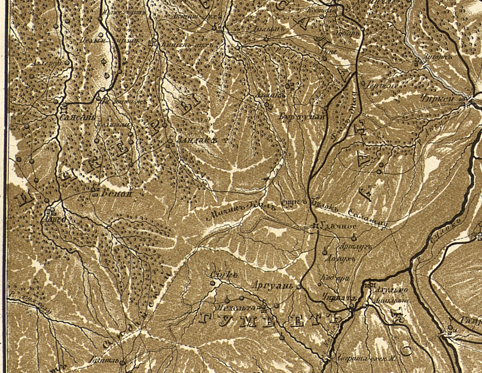 Мичи-Кале на карте. Карта театра военных действий главного Чеченского отряда в 1839 году под начальством Генерал-Адъютанта Граббе. Милютин Дмитрий Алексеевич Описание военных действий 1839 года в Северном Дагестане